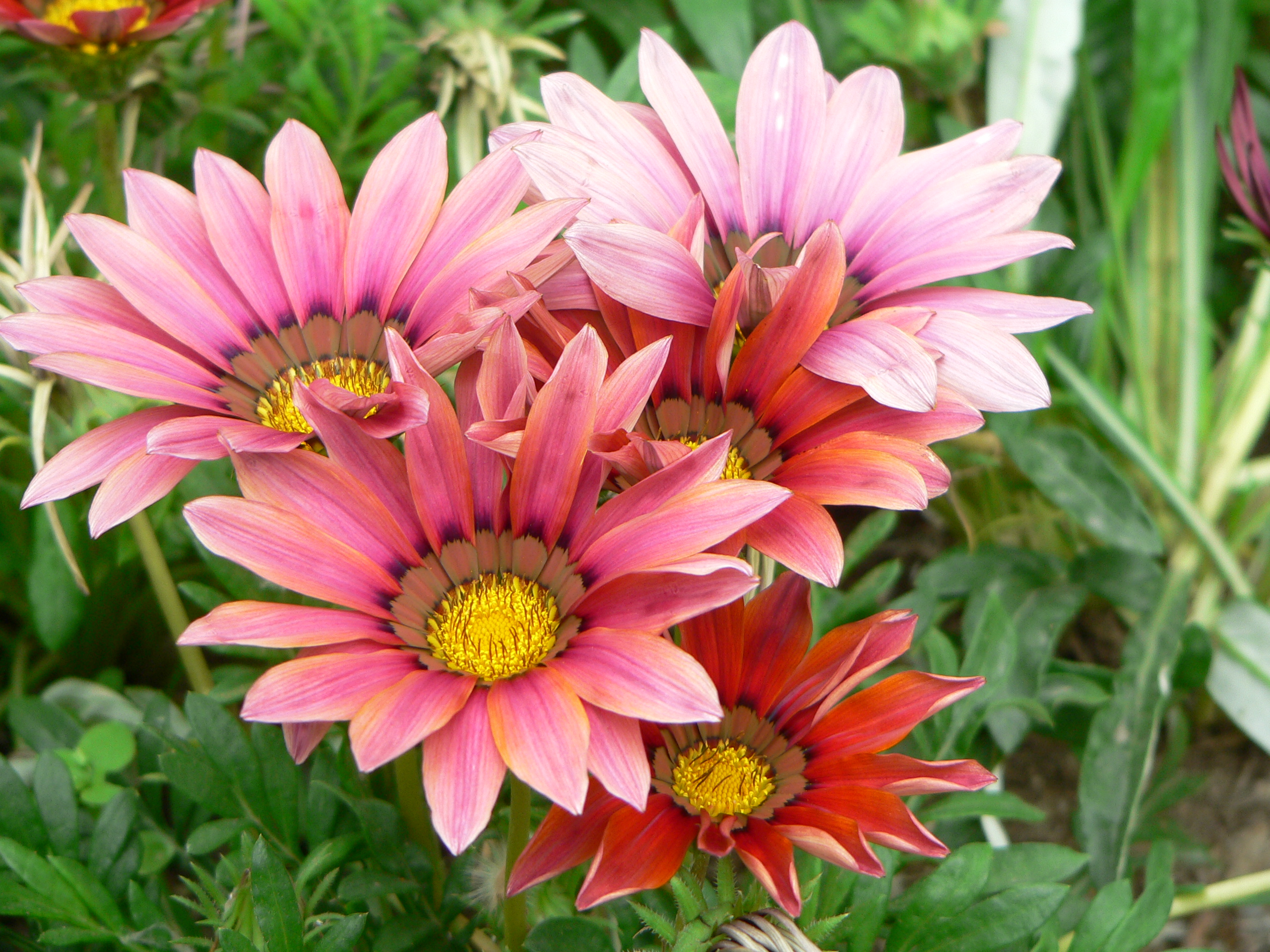 勋章菊（Gazania）,2005年春夏摄于zh:北京植物园